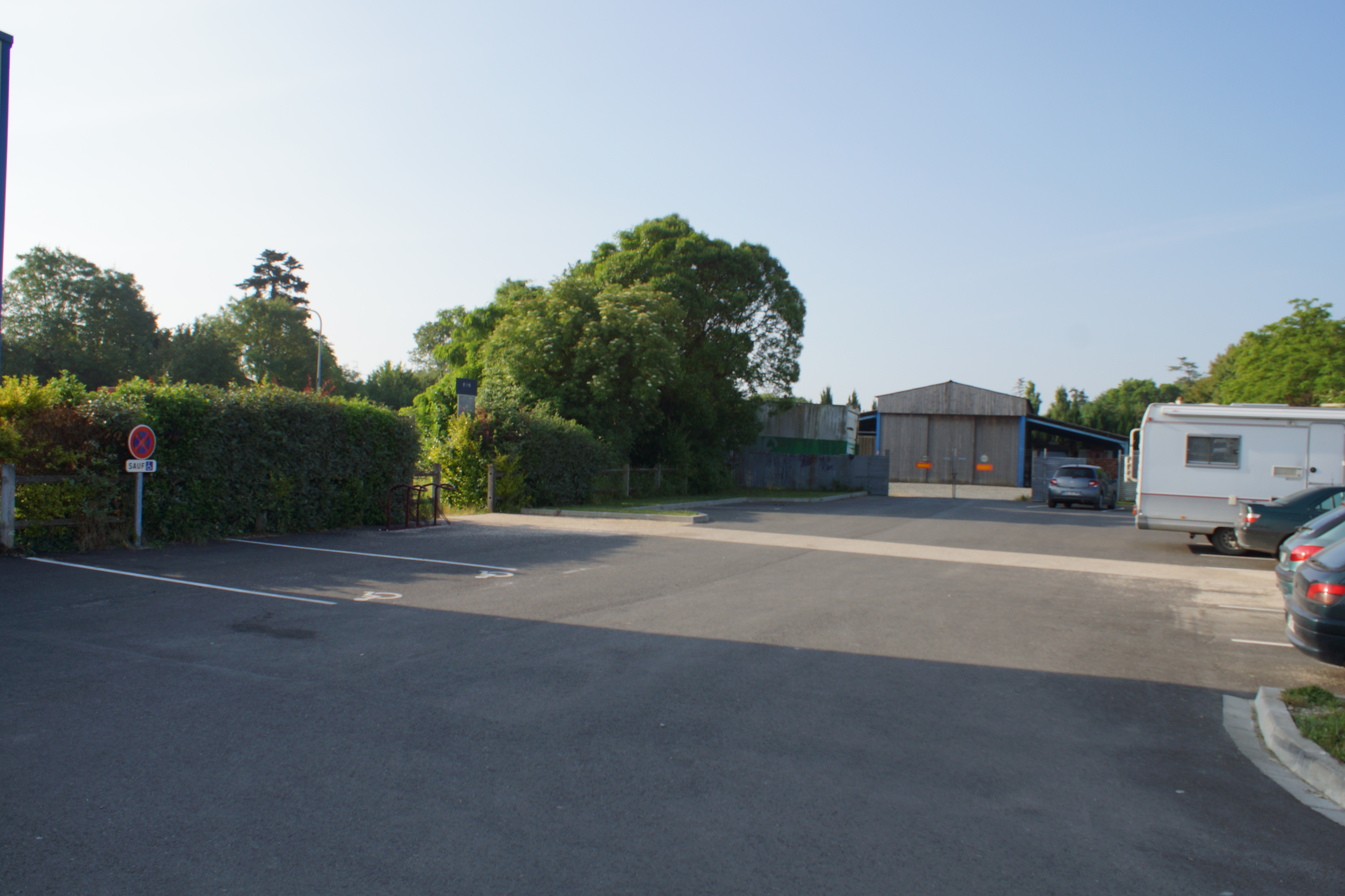 Halte ferroviaire de Fors : le parking avec un accroche vélo à trois places.